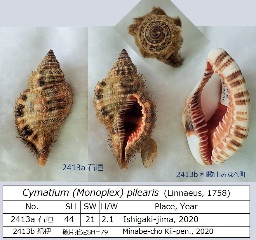 石垣島産（生貝）と紀伊半島千里の浜でひろった破片。